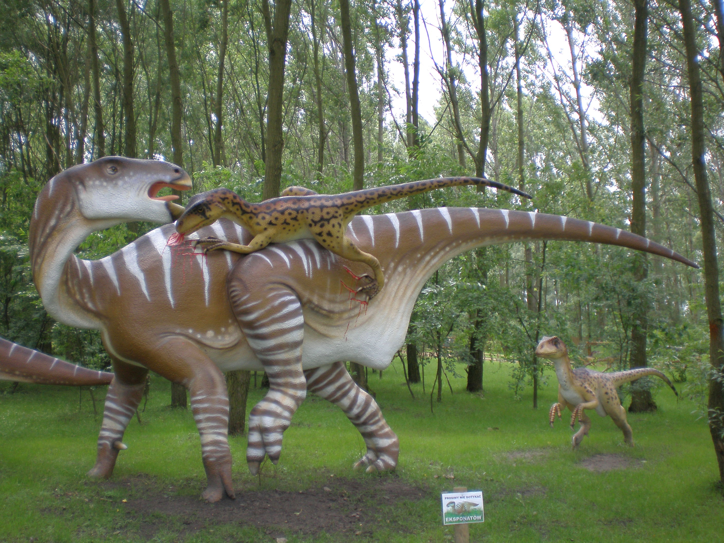 Rogowo, atak dinozaura